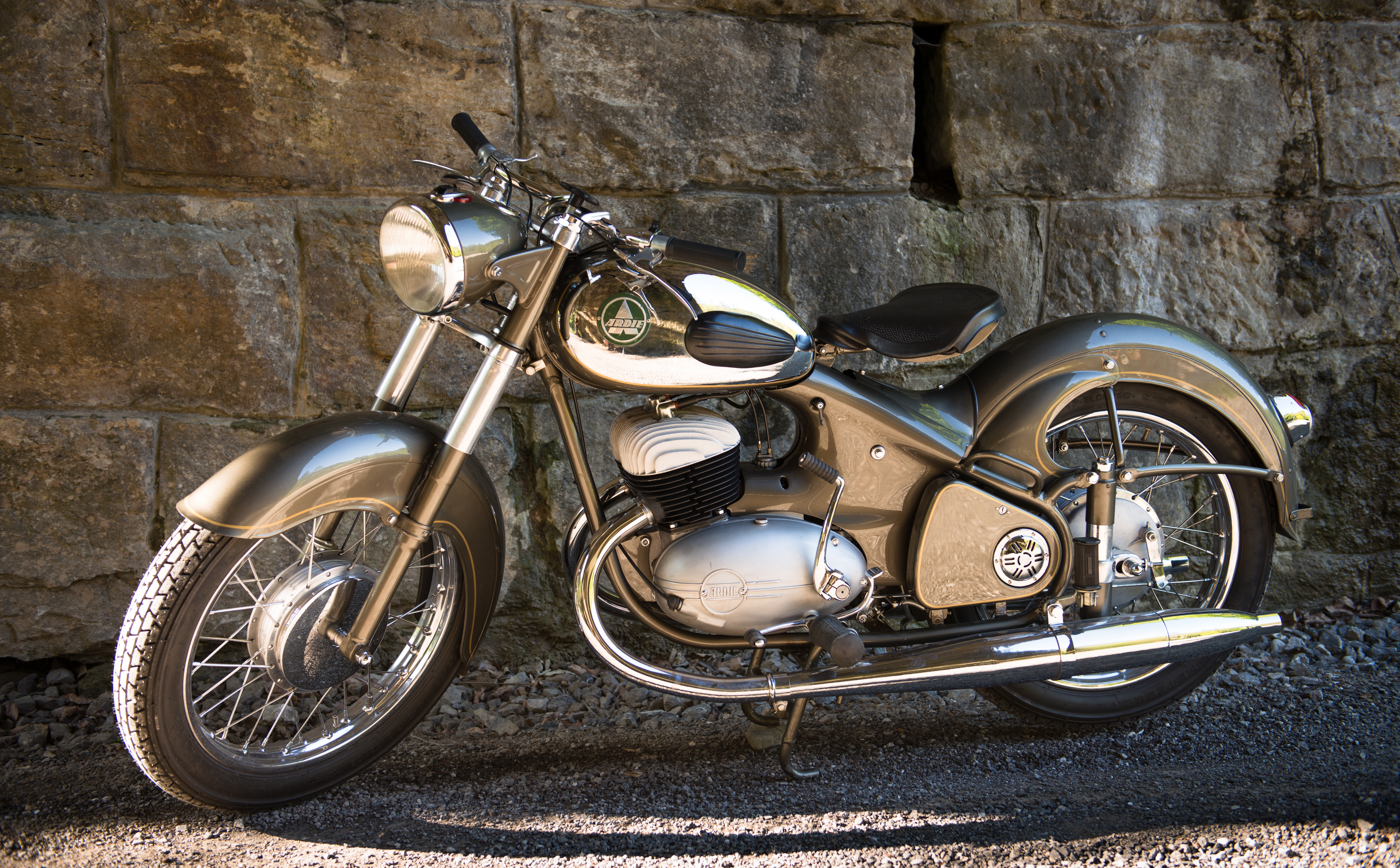 Motorrad Oldtimer Ardie 350.